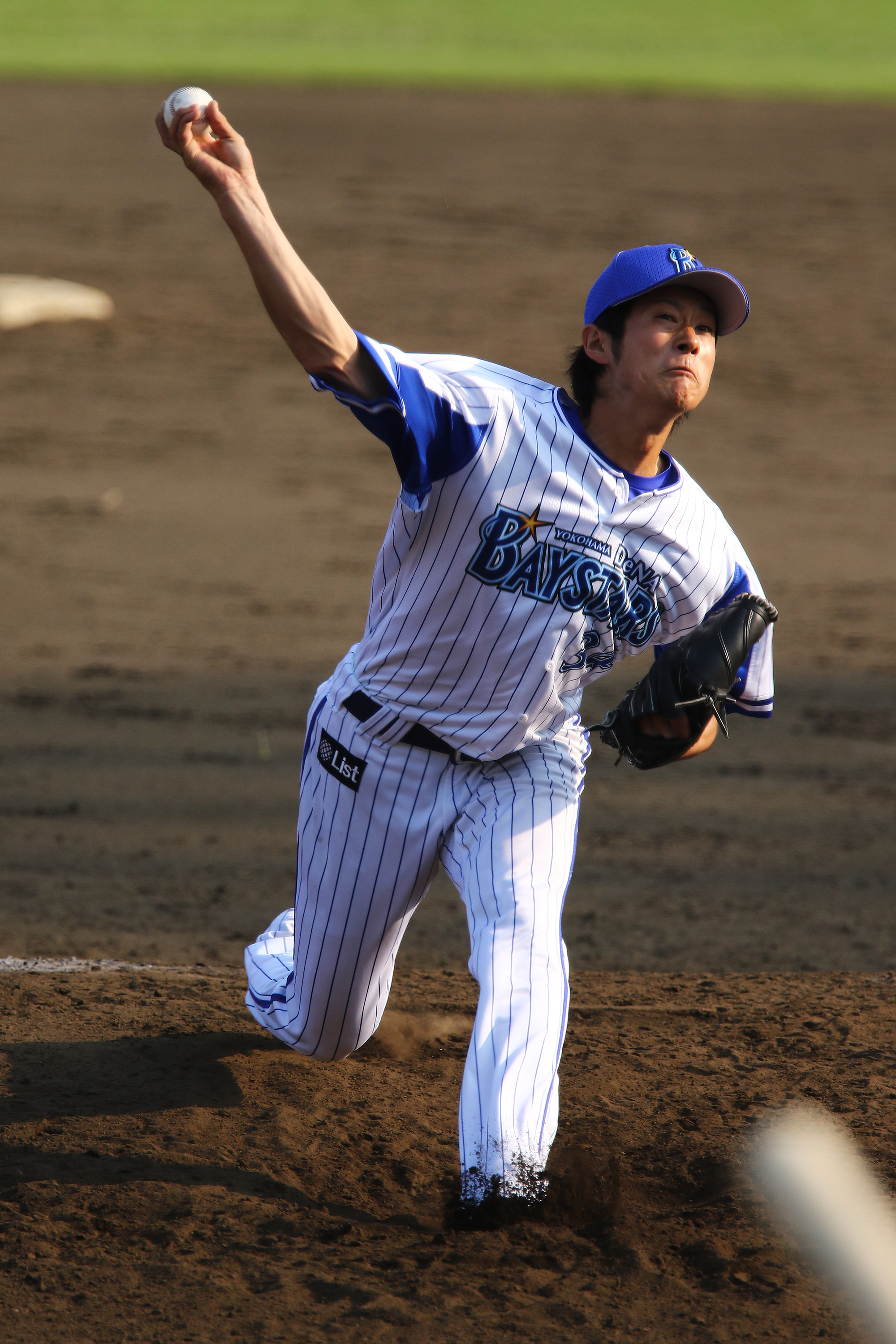 横浜DeNAベイスターズの平田真吾